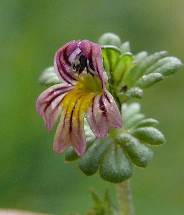 Euphrasia hirtella, Allgäuer Alpen, Deutschland